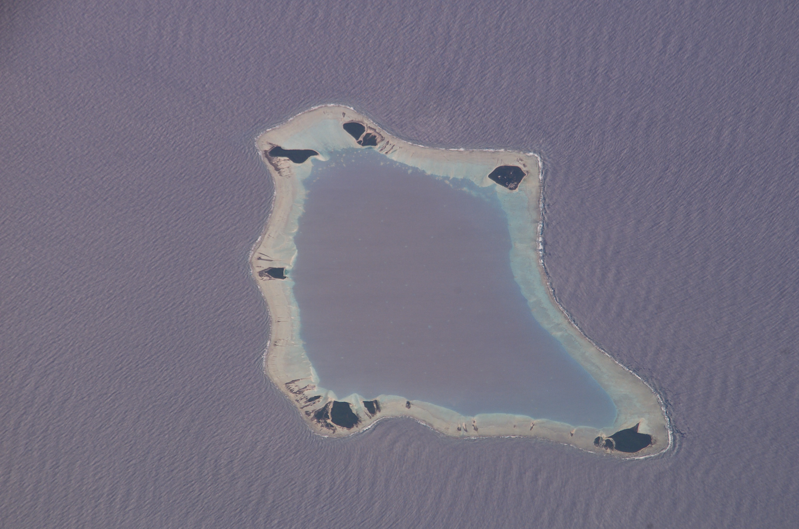 Cook Inseln Palmerston Atoll